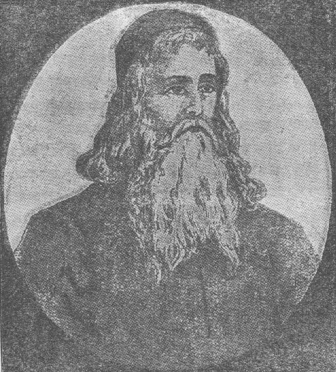 Rabbi Samuel Eidels, (1555 - 1631).